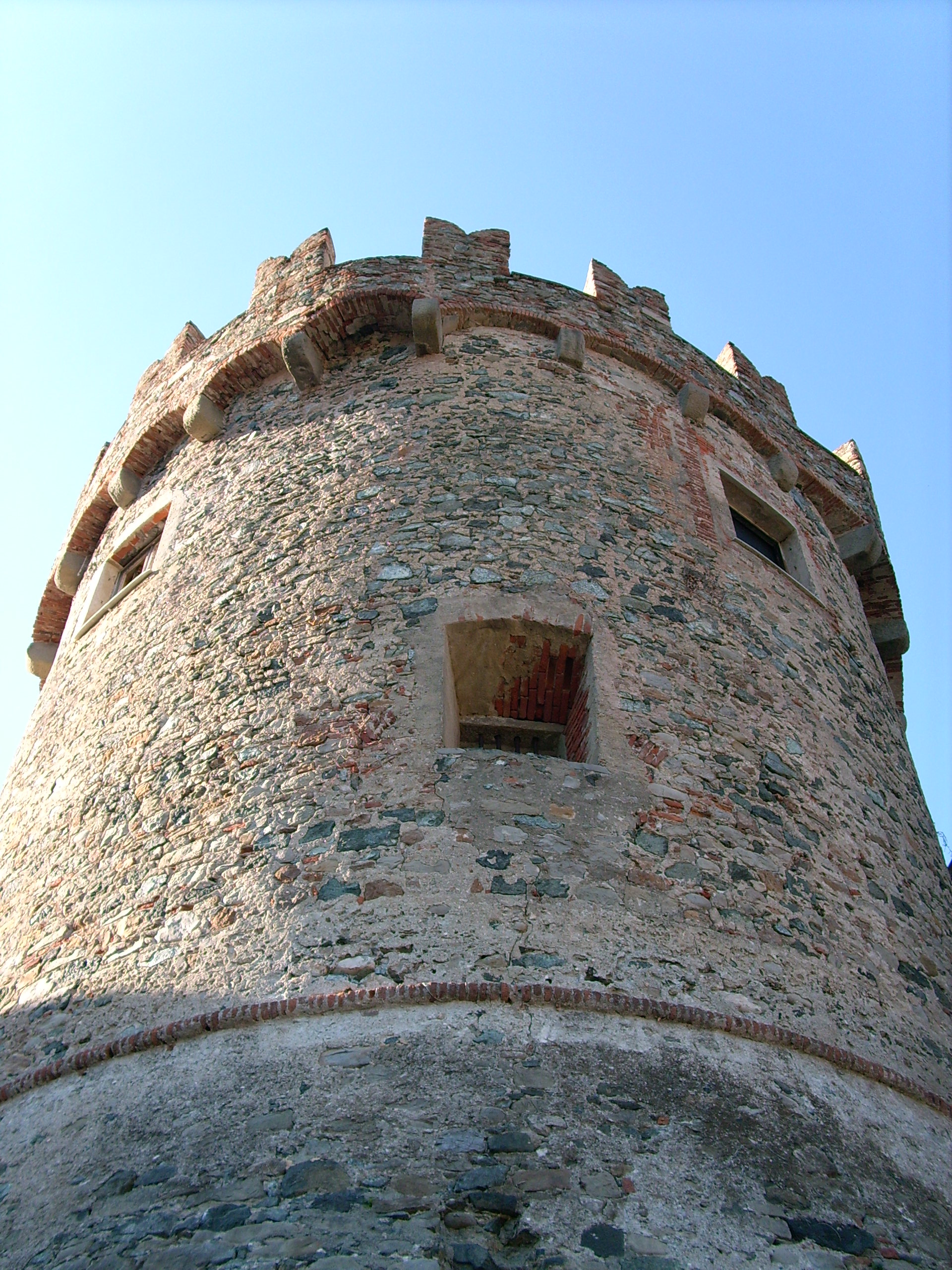 Torre del castello di Levanto, Liguria, Italia